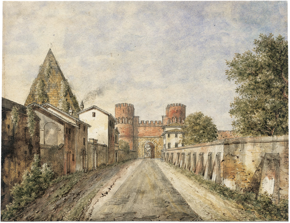 Rom, Porta Ostiense mit der Cestiuspyramide, Aquarell auf Velin. 17,1 x 22,2 cm. Französische Schule, 19. Jh.